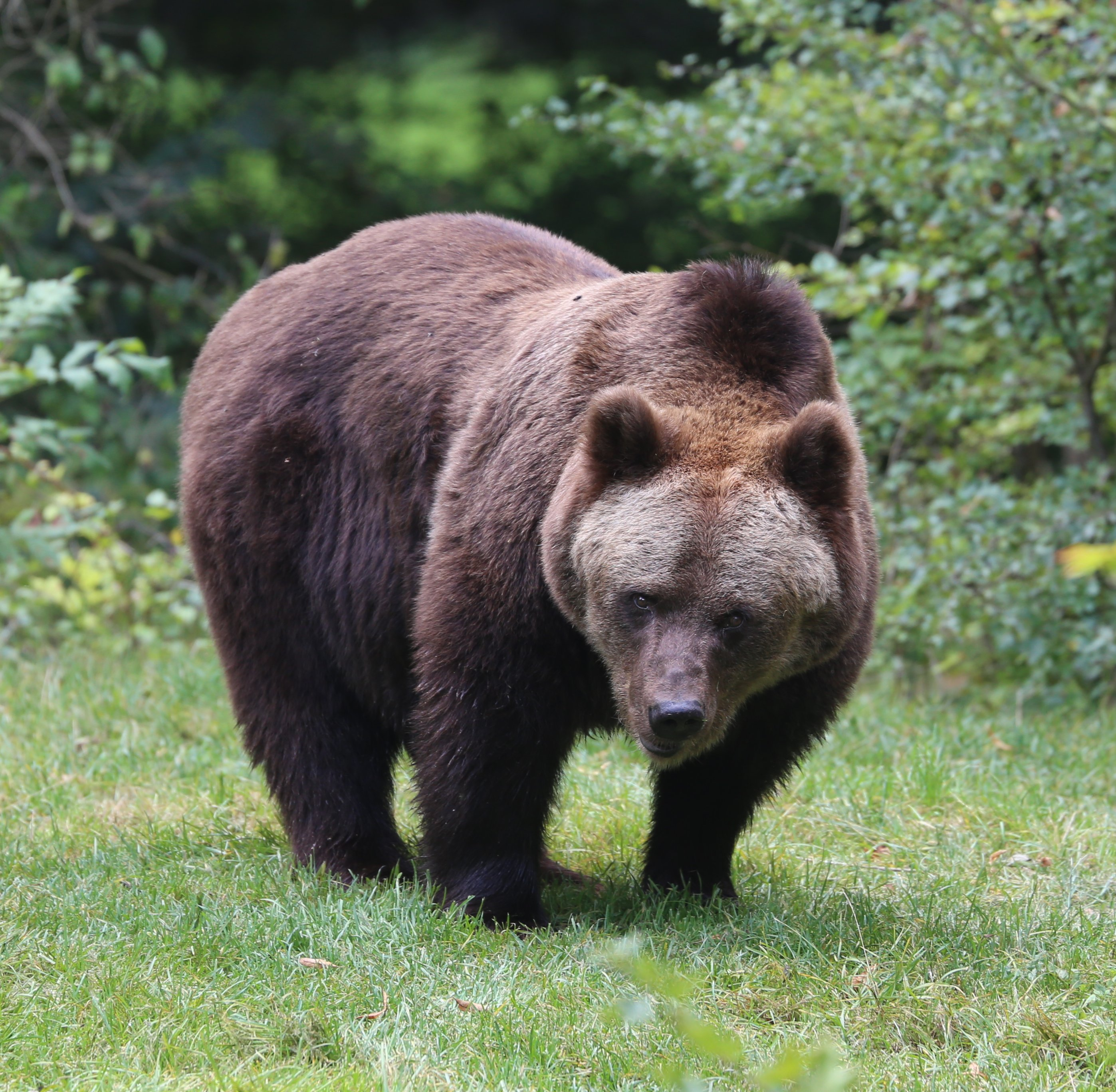 Tierpark Hellabrunn, Europäischer Braunbär, Ursus arctos arctos